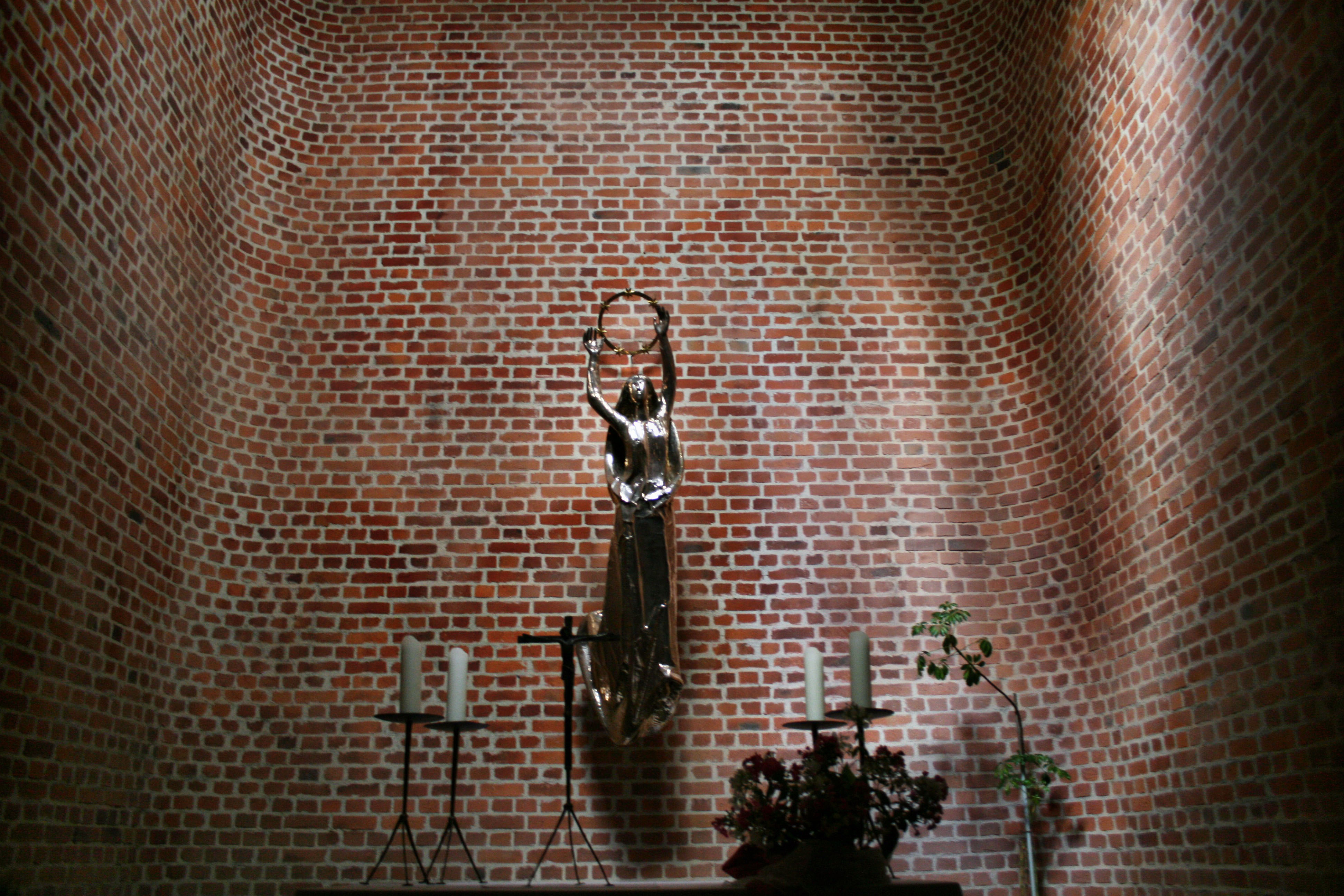 Marienkapelle, Mariä Himmelfahrt